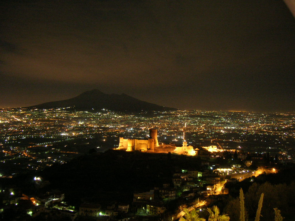 Veduta notturna del Vesuvio da Lettere con in primo piano il castello e sullo sfondo la piana del Sarno